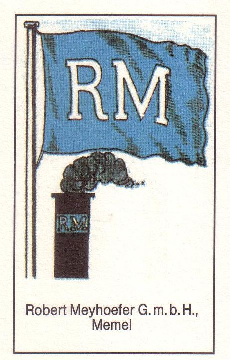 Flagge der Reederei Meyhoefer, Memel